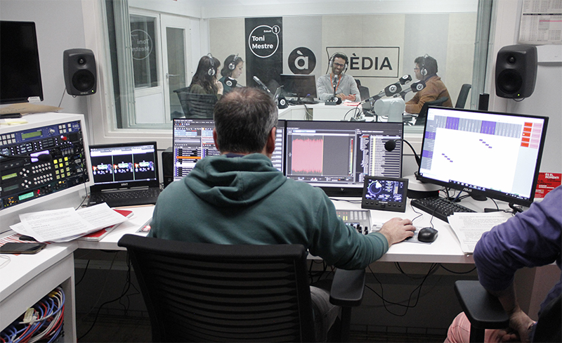 Estudi 1 Toni Mestre, de À Punt Mèdia, radio autonómica de la Comunidad Valencia, España.